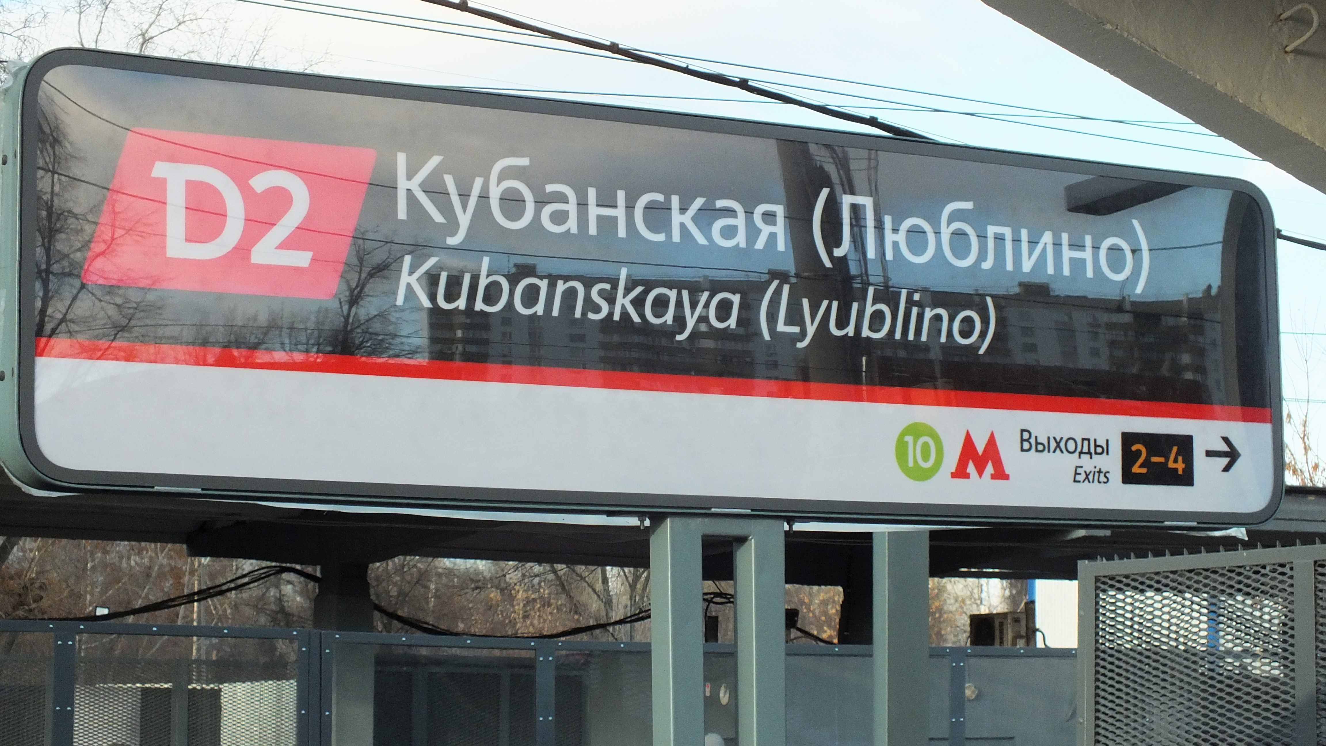 Табличка с новым названием платформы Кубанская и старым (в скобках) — Люблино. Фотография 1 декабря 2019 года